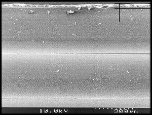 SEM lenticulaire